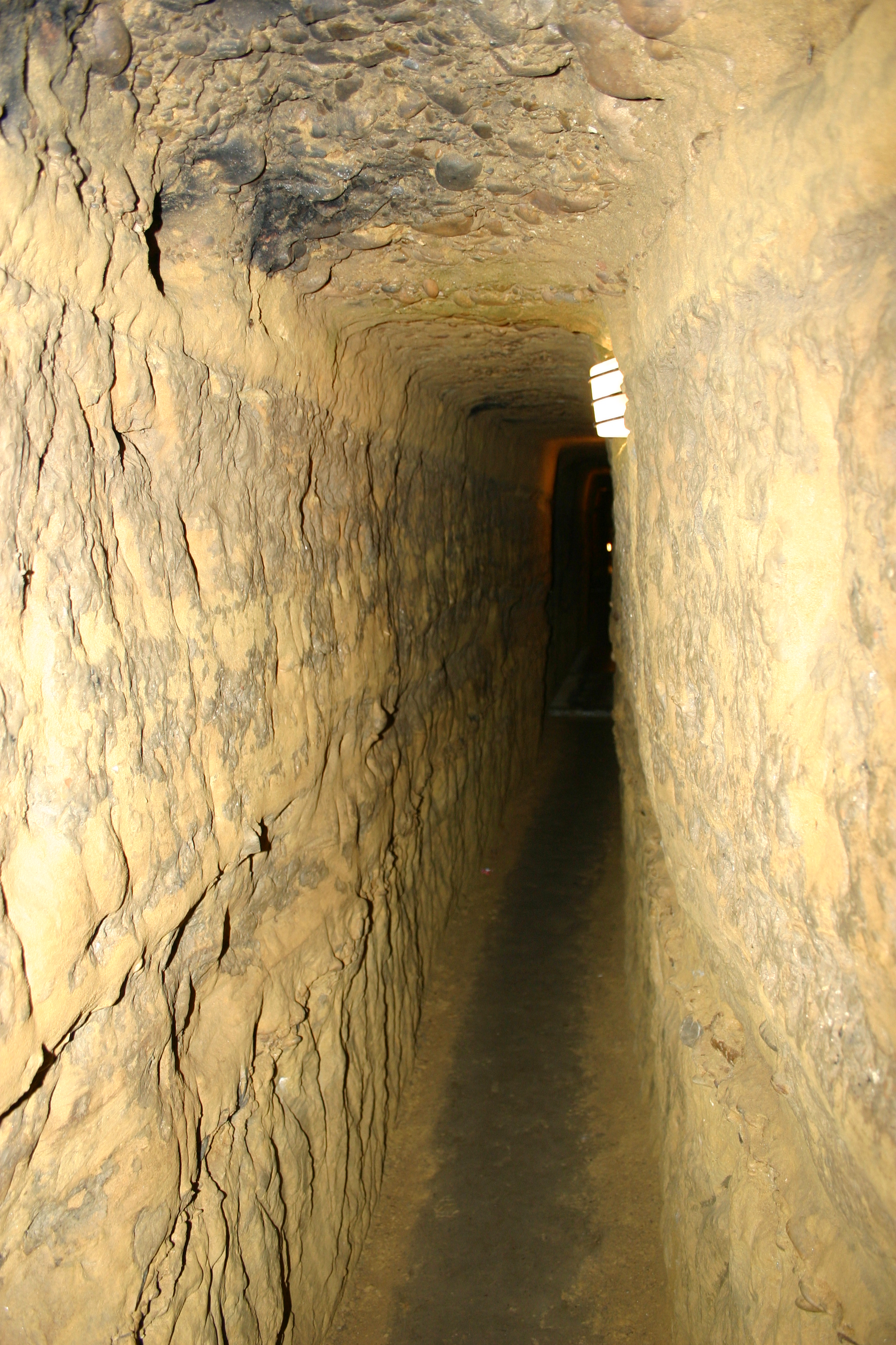 Chiusi - Labirinto di Porsenna - Cunicolo.